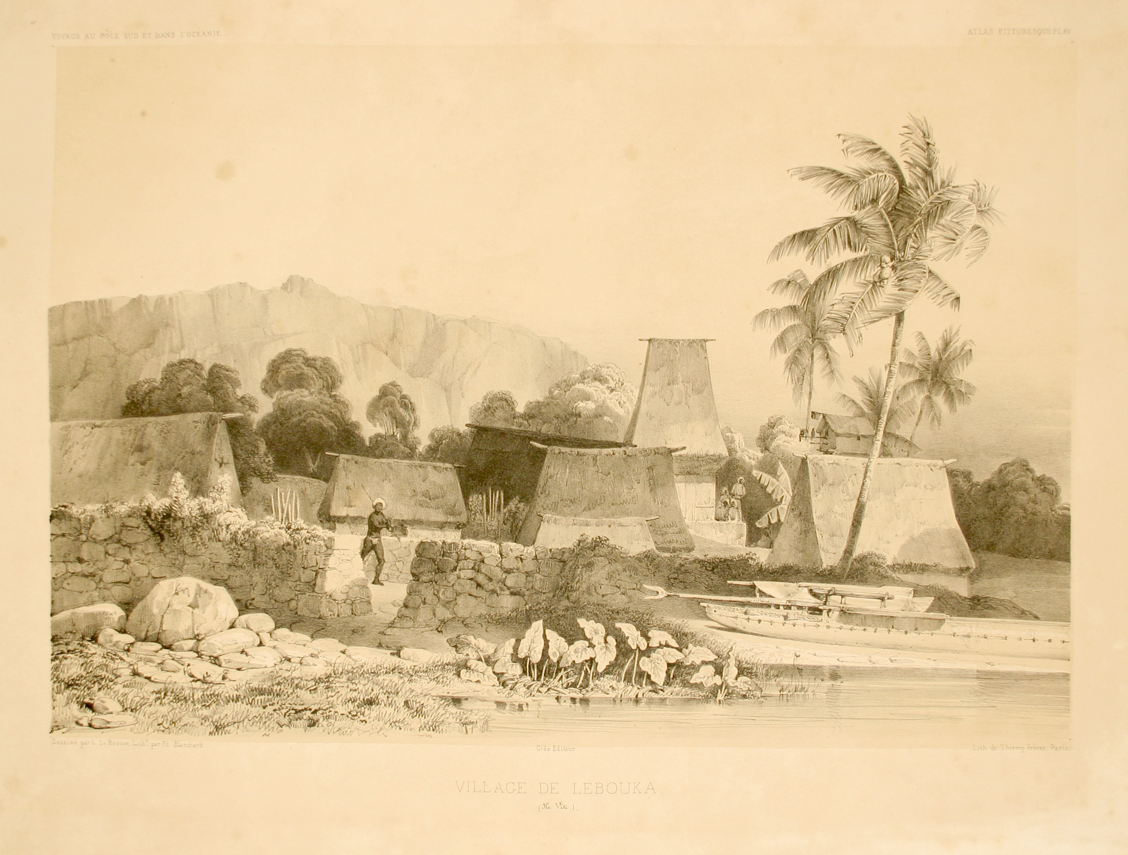 Village de Lebouka. Atlas pittoresque, planche 89 (actuellement Levuka)